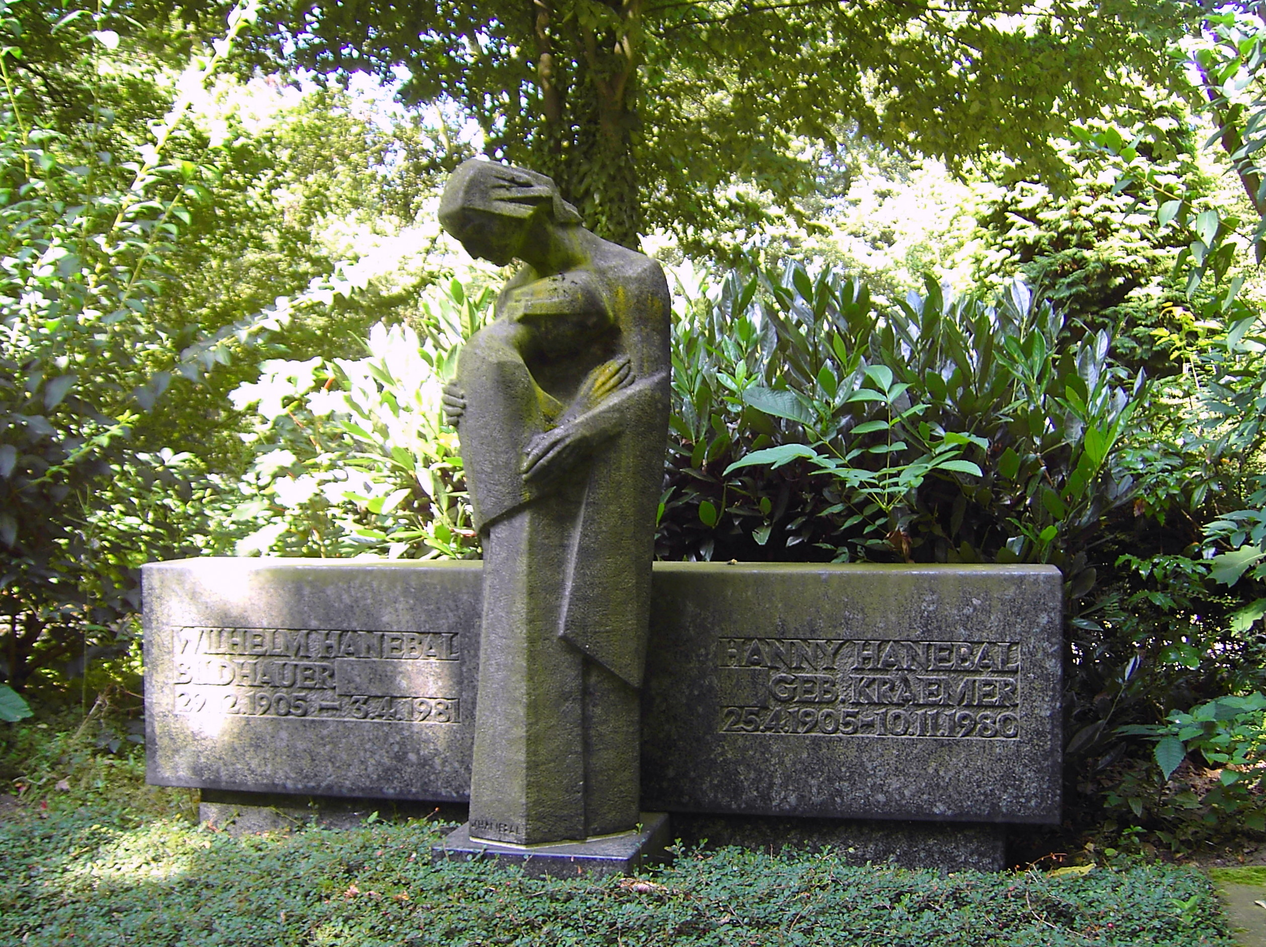 Grabmal Wilhelm Hanebal, Meerbusch-Büderich